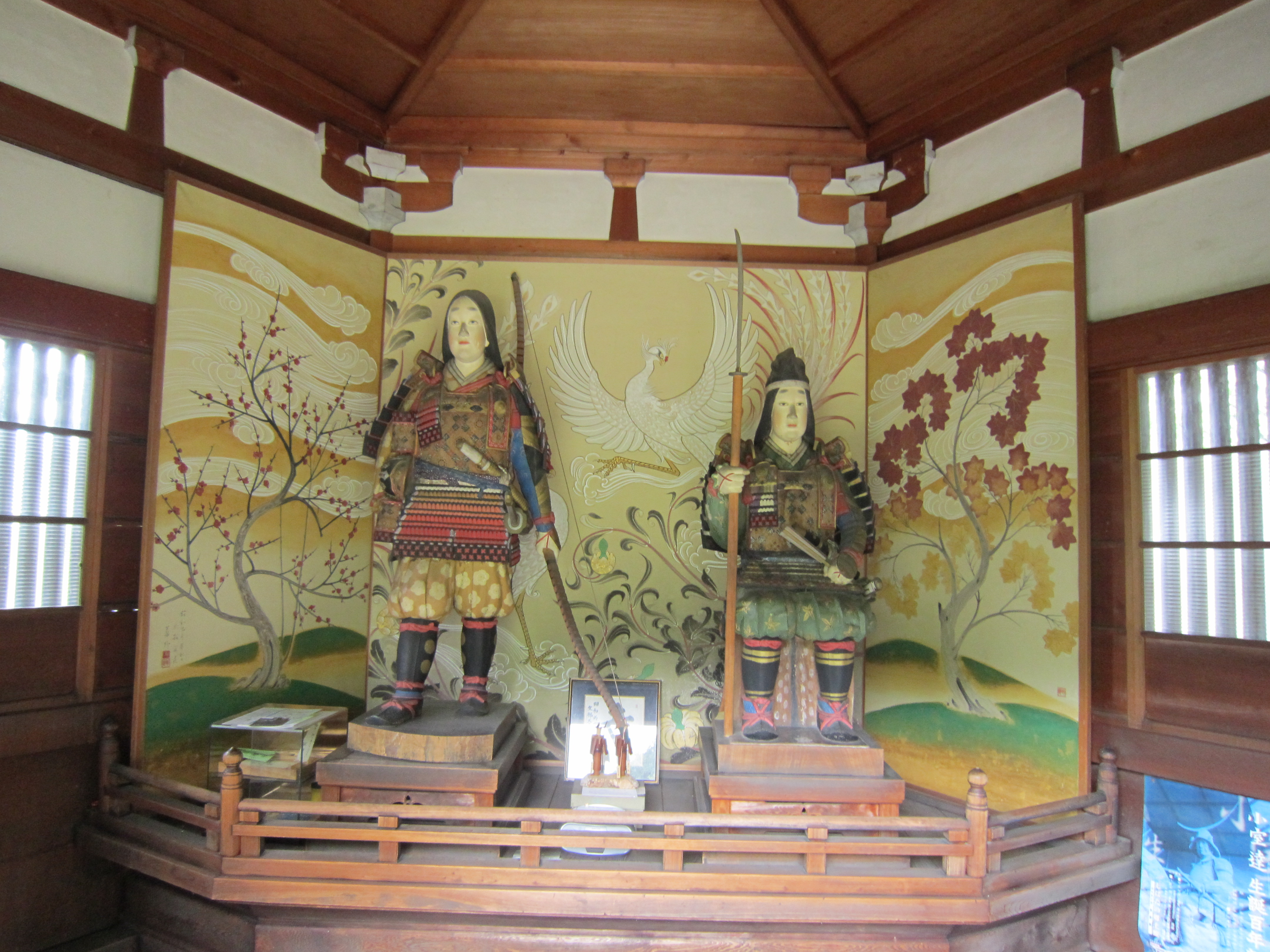 楓・初音の像。製作は小室達。